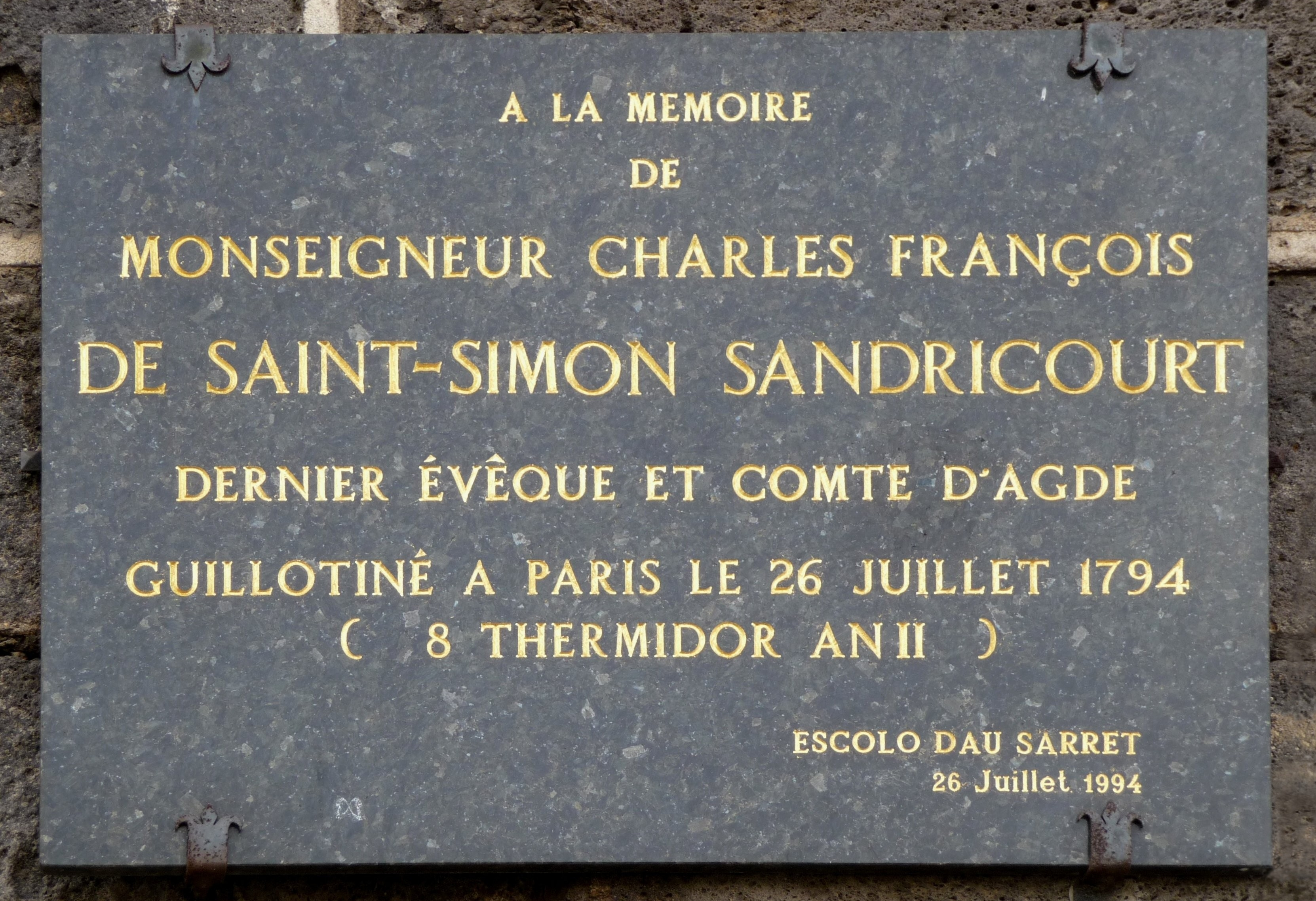 Plaque commémorative de la mort de Mgr Saint-Simon Sandricourt, dernier évêque d'Agde, (Hérault, France)